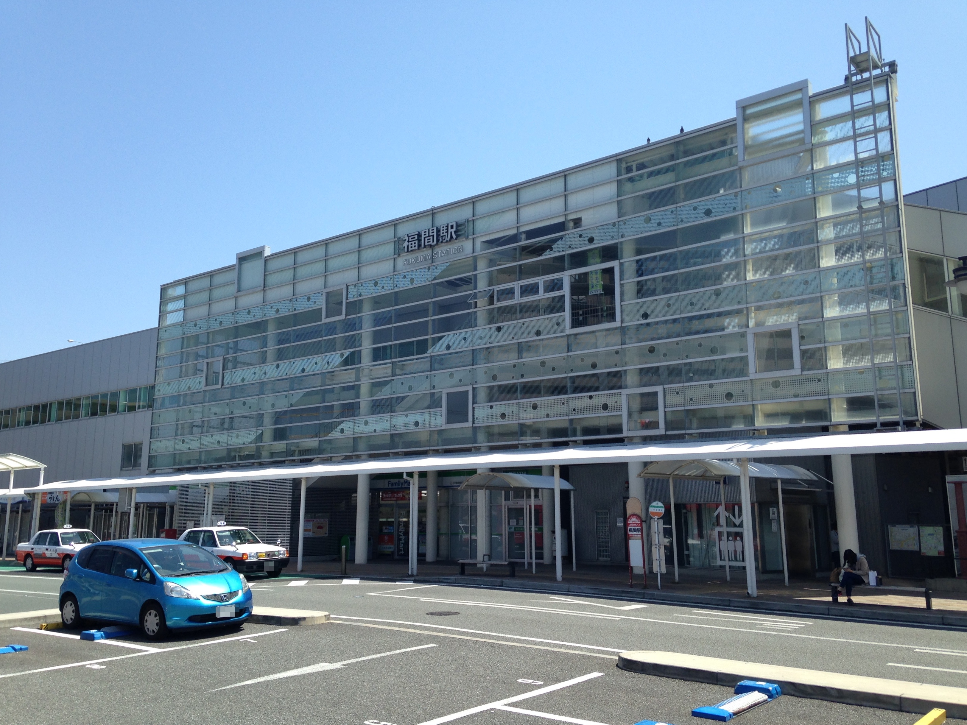 福間駅西口駅舎